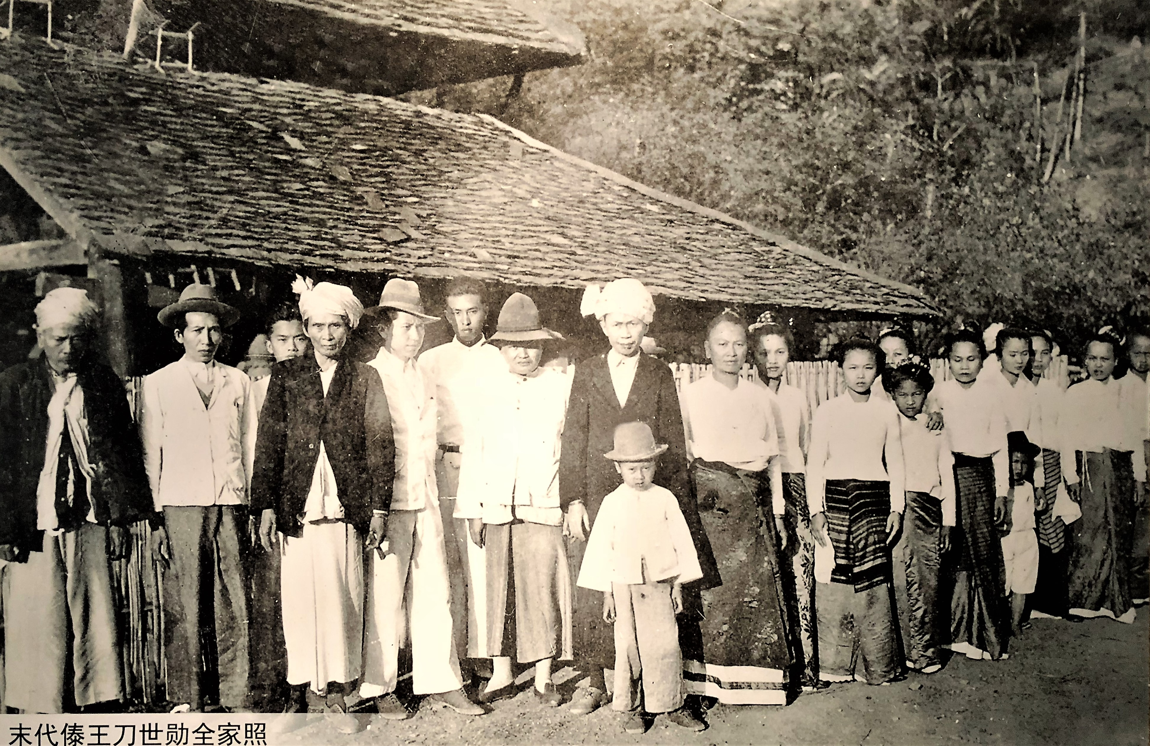 中文（中国大陆）: 末代傣王刀世勋全家照